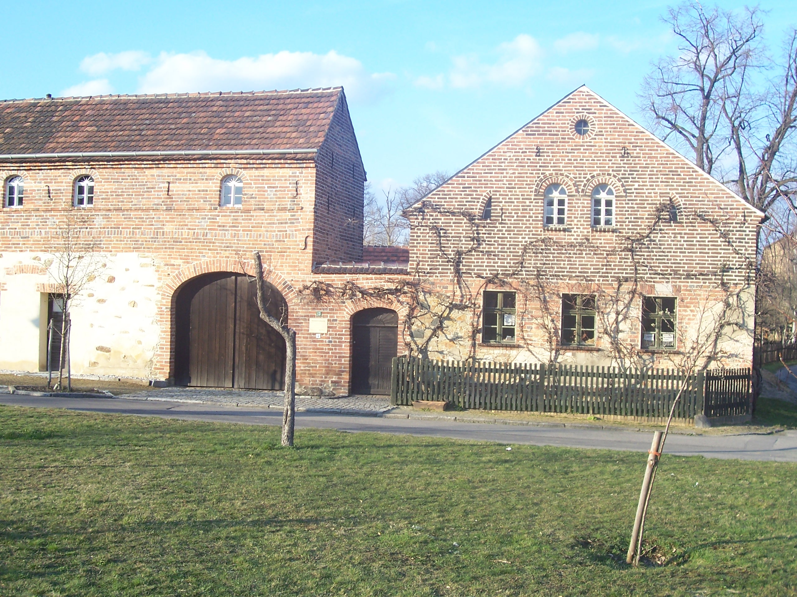 Museumshof Großkoschen - Senftenberger Vierseithof.